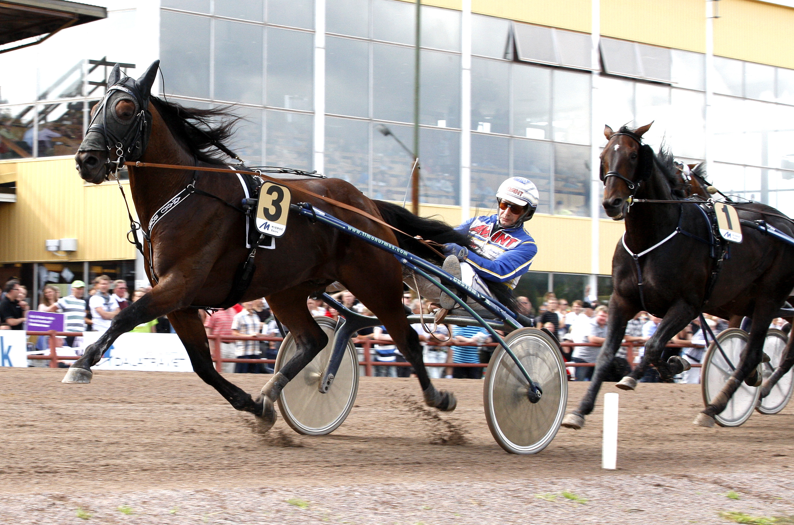 Kusken Jorma Kontio med travaren Amaru Boko (ekipage nr. 3) vinner loppet Ego Boys Minne på Rättvikstravet 2012.